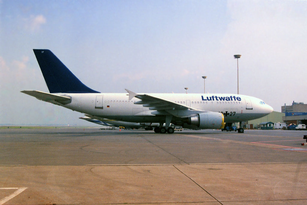 Luftwaffe A310-304 10+27